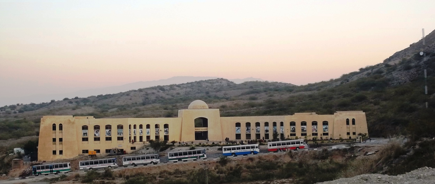 نمل کالج